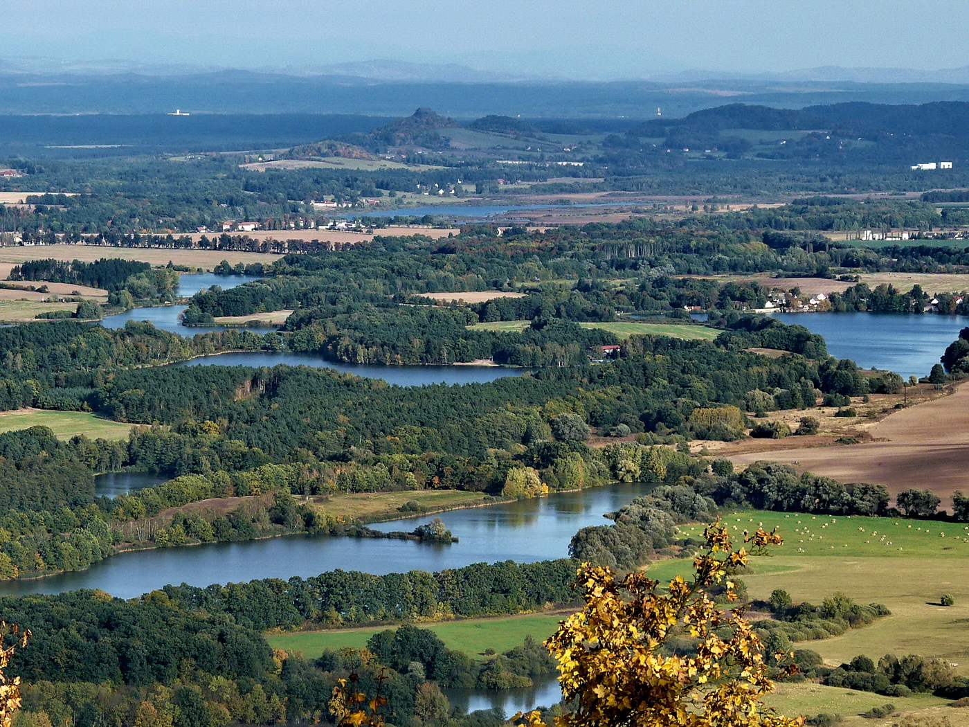 Pohled z Ronova na Holanské rybníky, Novozámecký rybník, Provodínské kameny